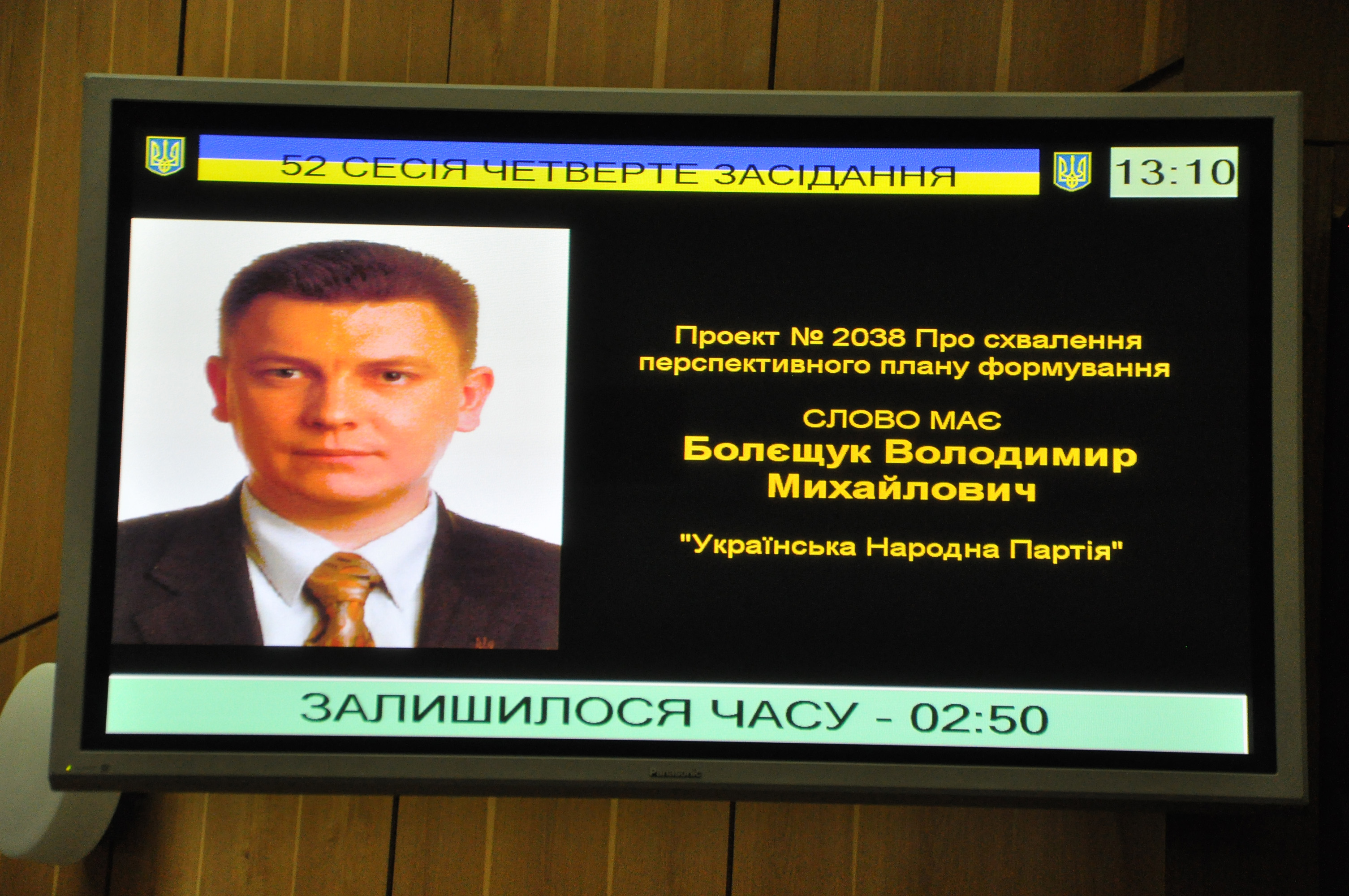 4-те пленарне засідання 52-ої сесії Тернопільської обласної ради 13 серпня 2015 року. Слово має Болєщук Володимир Михайлович.